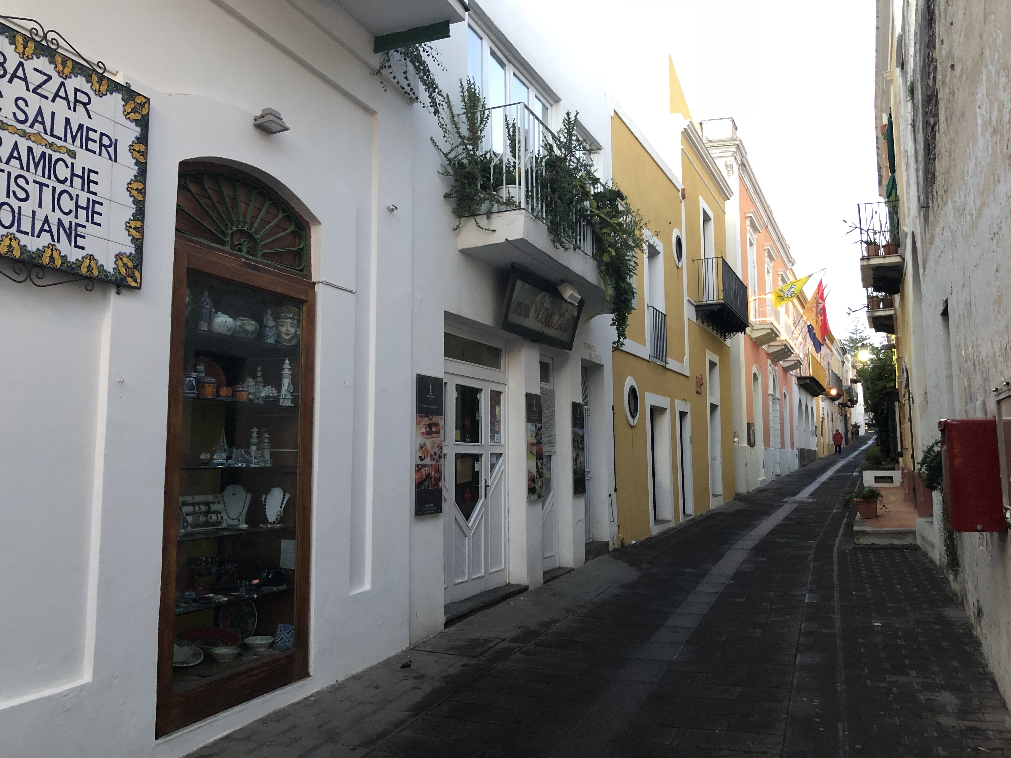 Via Risorgimento - Santa Marina Salina